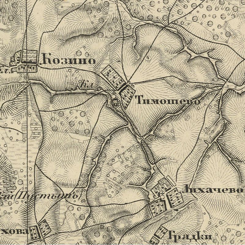 Деревня Тимошево Волоколамского района Московской области России на карте Ф. Ф. Шуберта